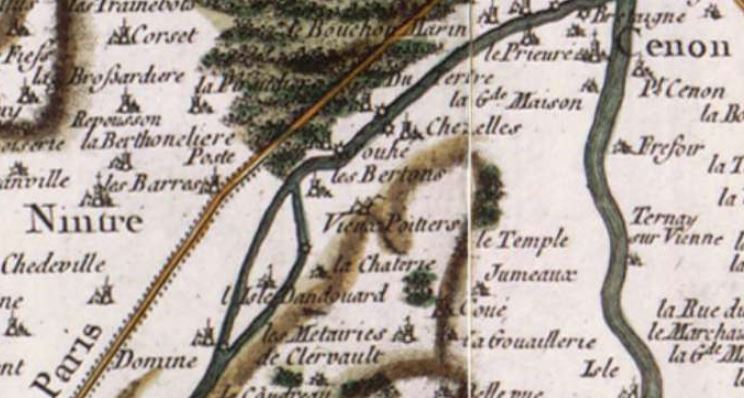 Le site archéologique du Vieux-Poitiers sur un extrait de carte de César-François Cassini.